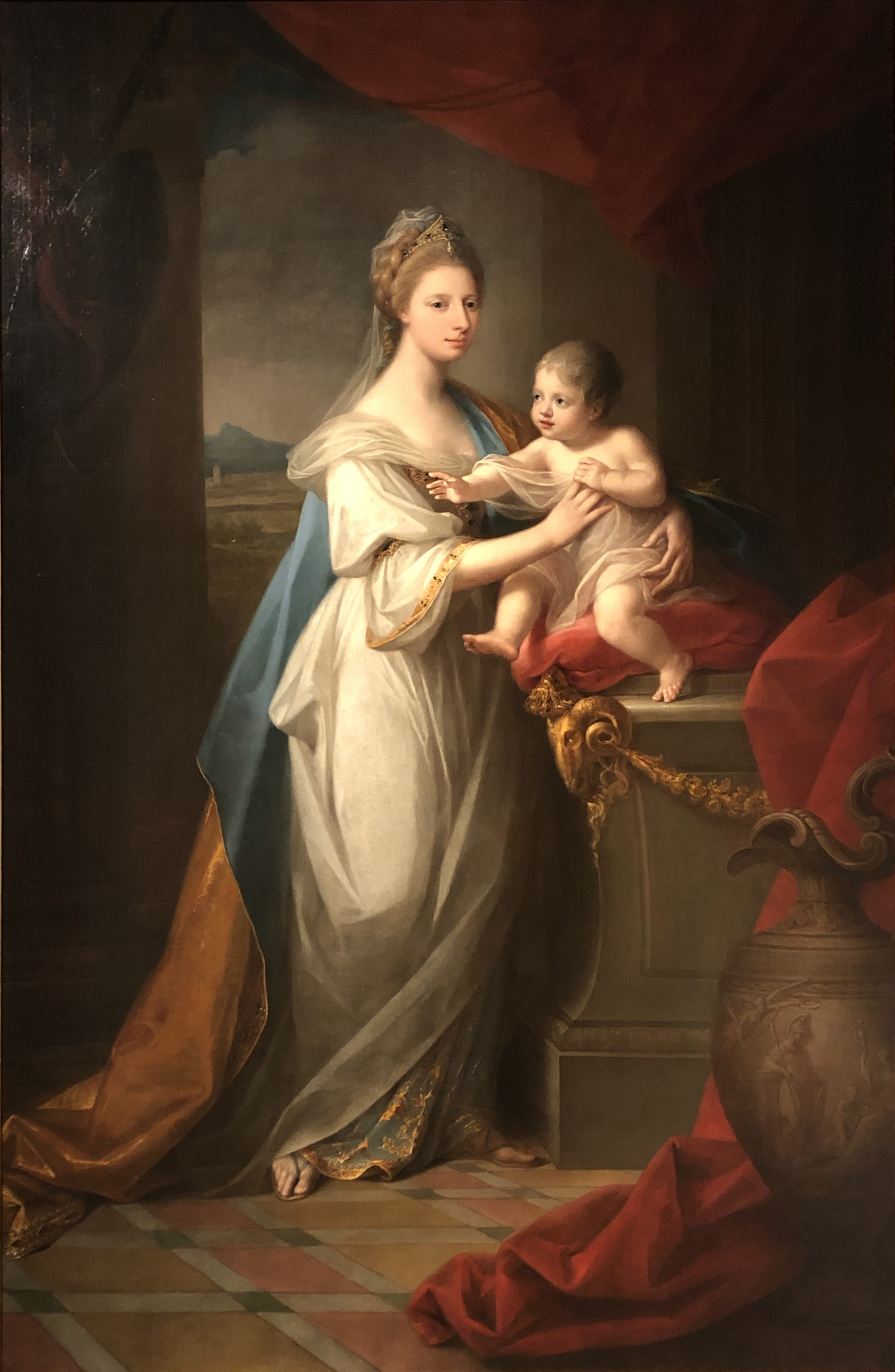 Angelika Kauffmann, Bildnis Augusta Friederike Luise, Herzogin von Braunschweig-Lüneburg, Prinzessin von Großbritannien, mit Prinz Charles George Augustus (1767), Öl auf Leinwand, lent by her Majesty Queen Elizabeth II, im Museum Kunstpalast, Februar 2020